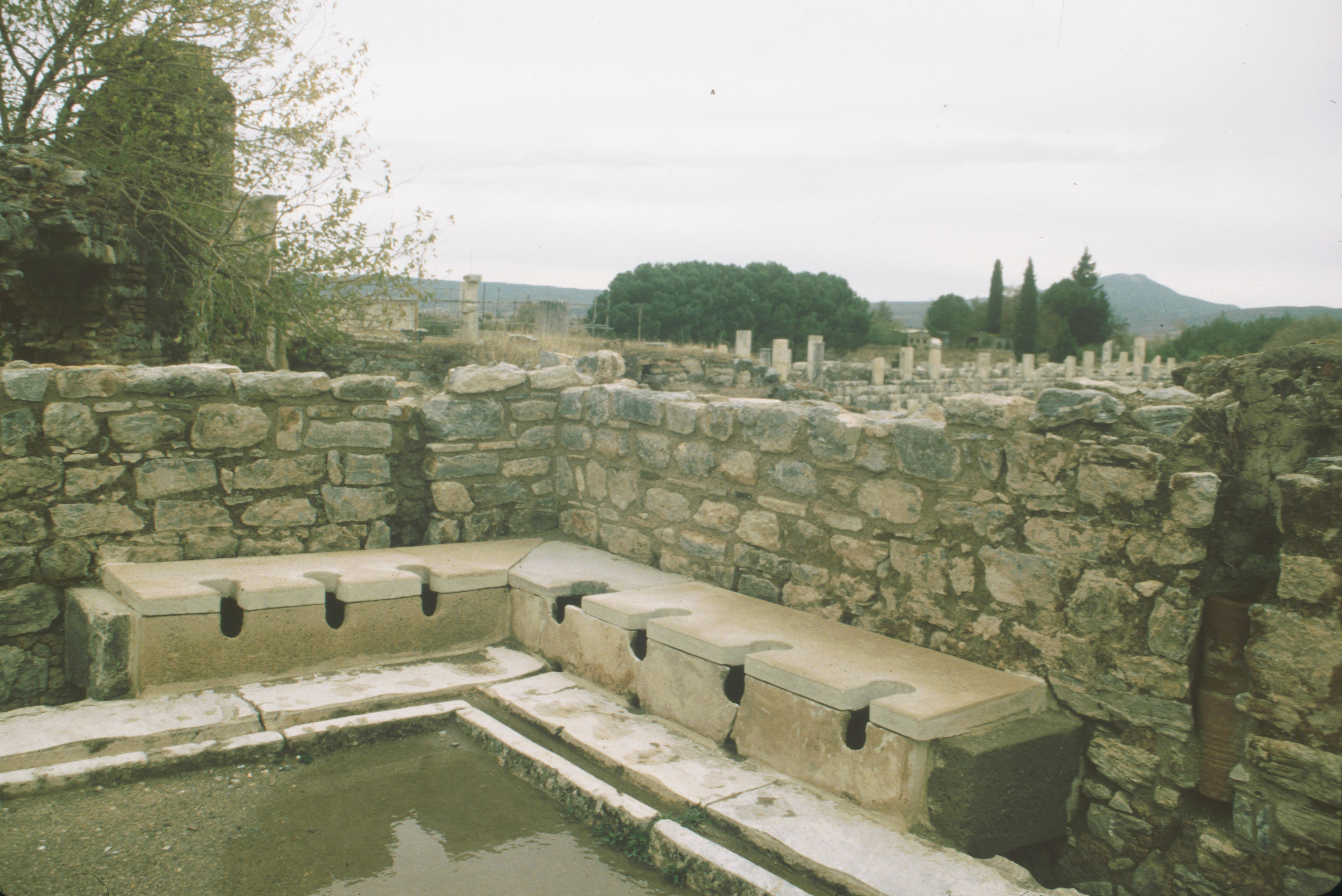 Antike Toilettenanlage in Ephesus